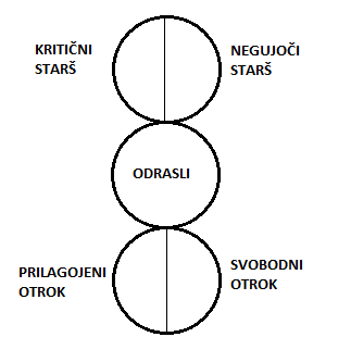 Funkcionalni model ego stanj